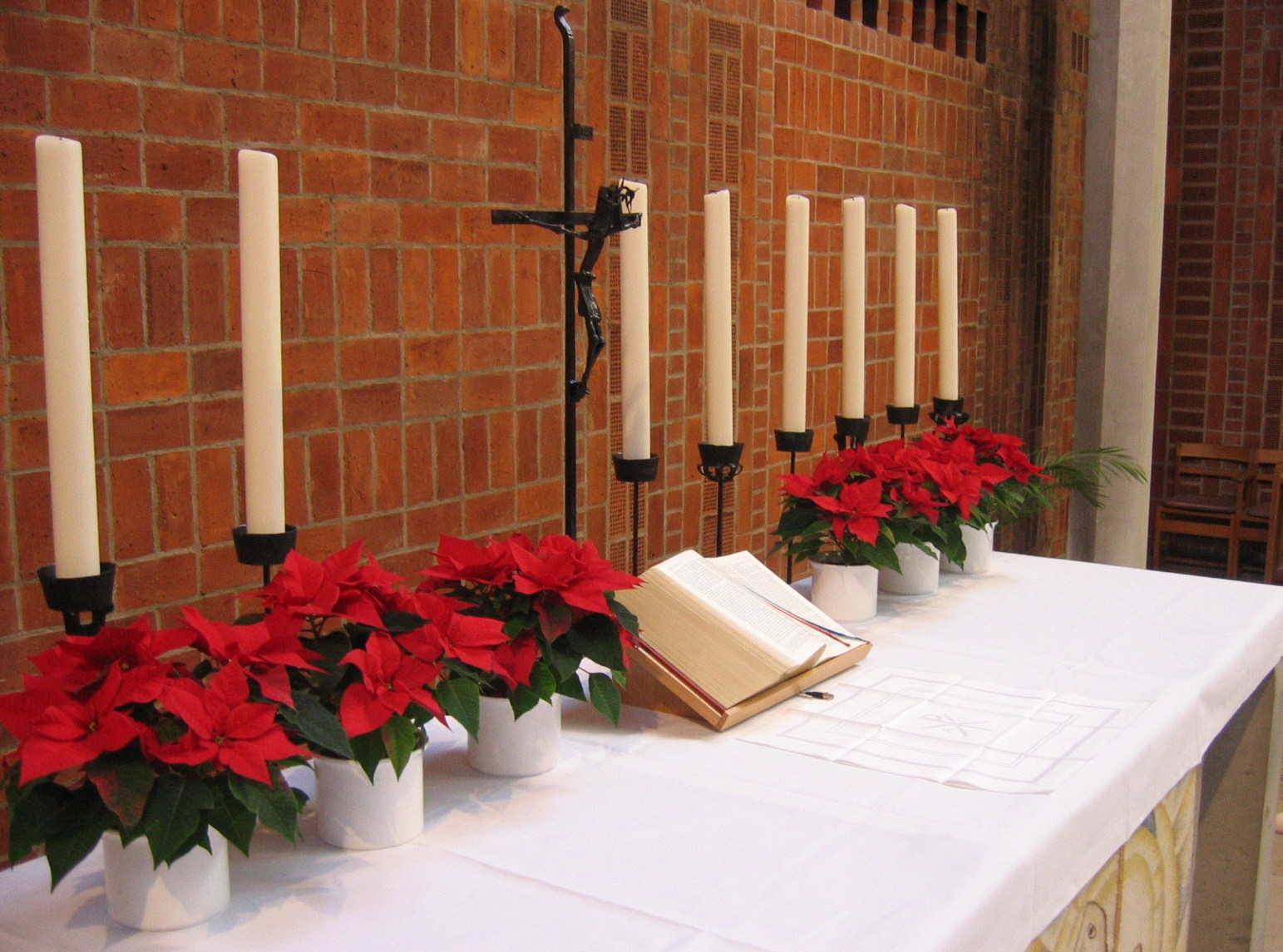 Altar der Paul-Gerhardt-Kirche in München.